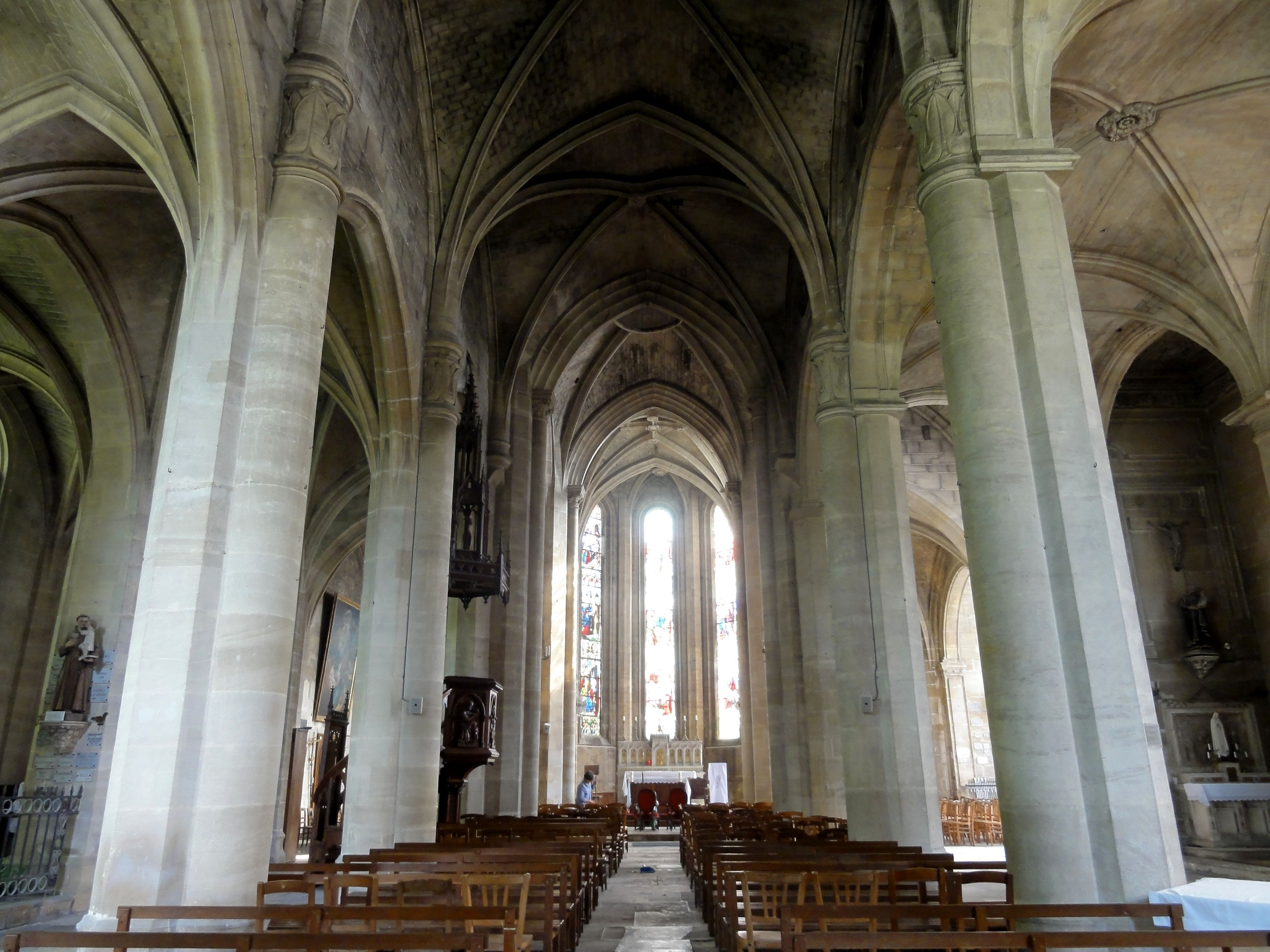 Vue générale intérieure.